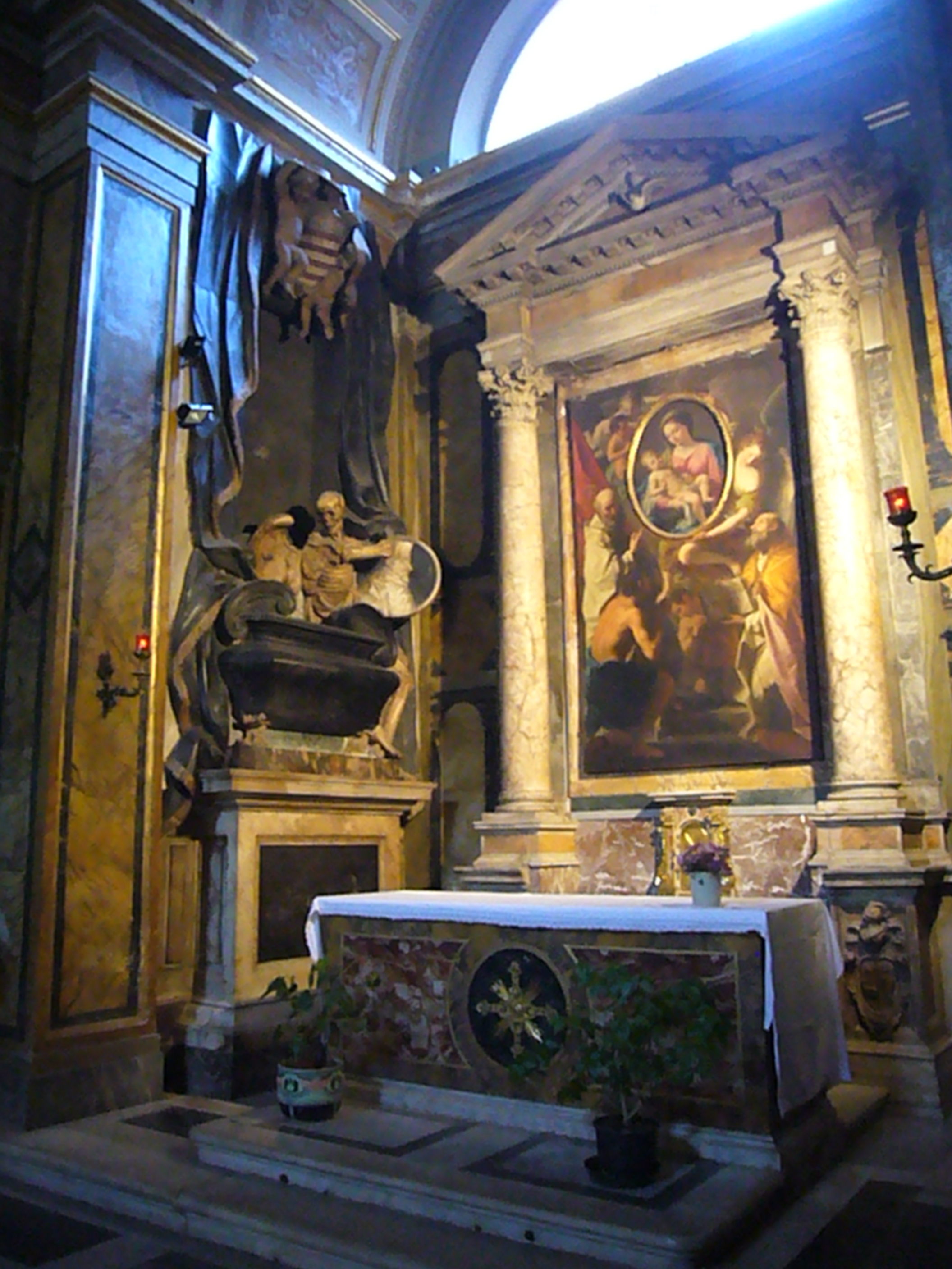 Roma, santa Maria in Monterone, altar maggiiore e monumento funebre del cardinale Stefano Durazzo (m. 1667)